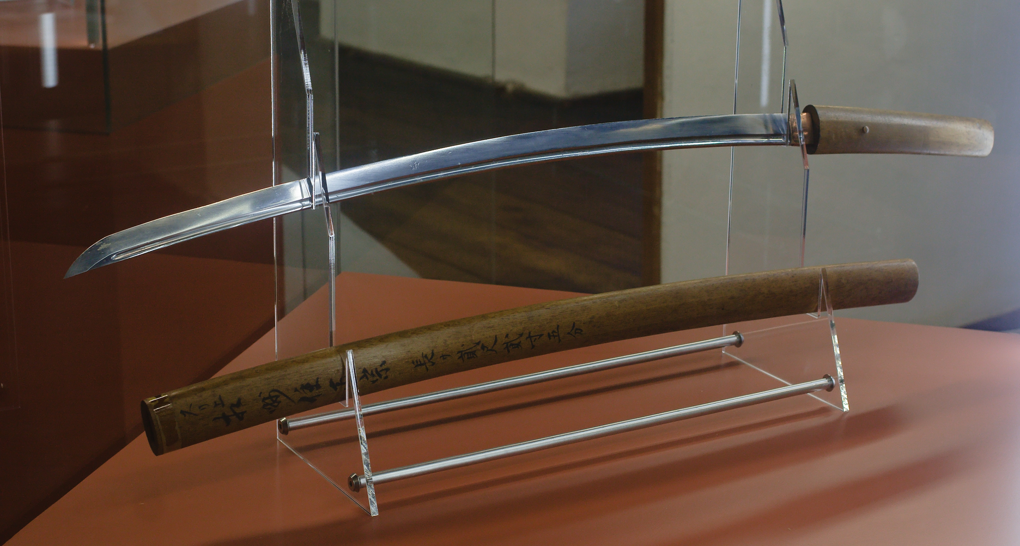 Masamune-Schwert im Museum der Stadt Steyr (Sonderausstellung)